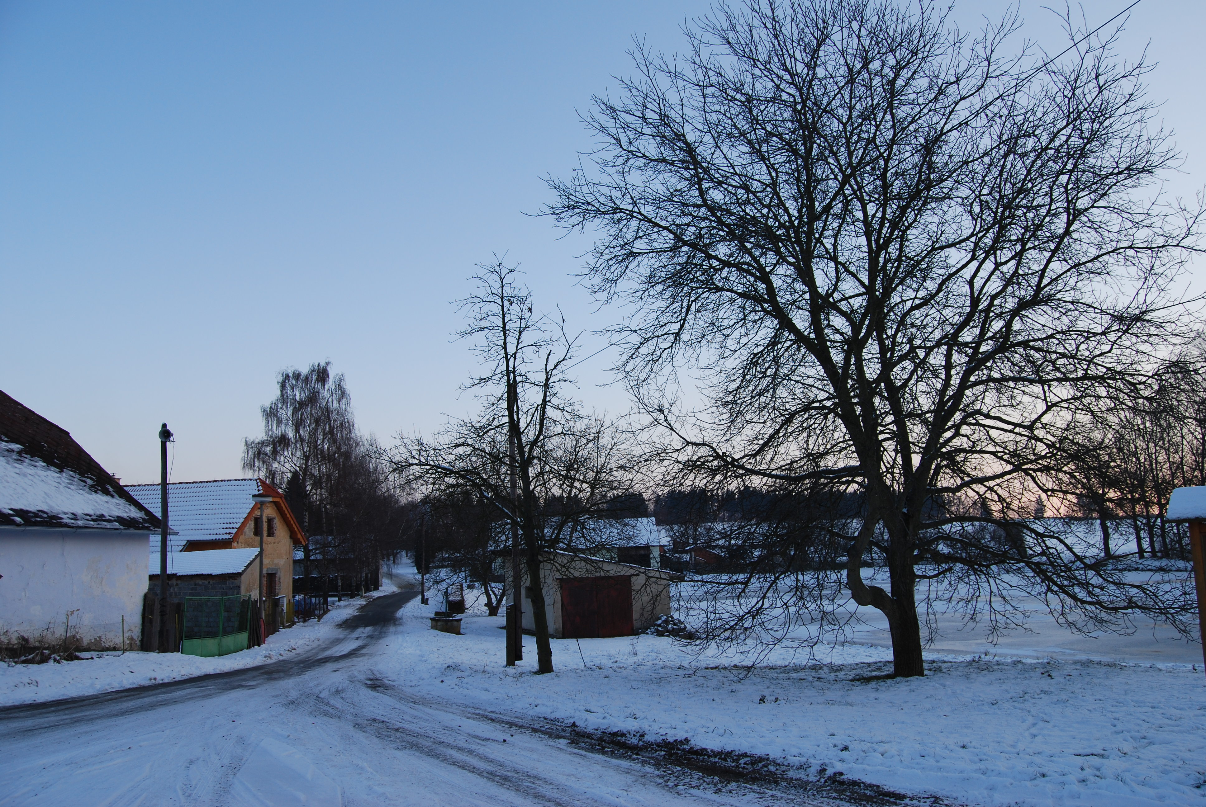 Pohled na část obce. Touškov je část města Mirovice v okrese Písek. Česká republika.